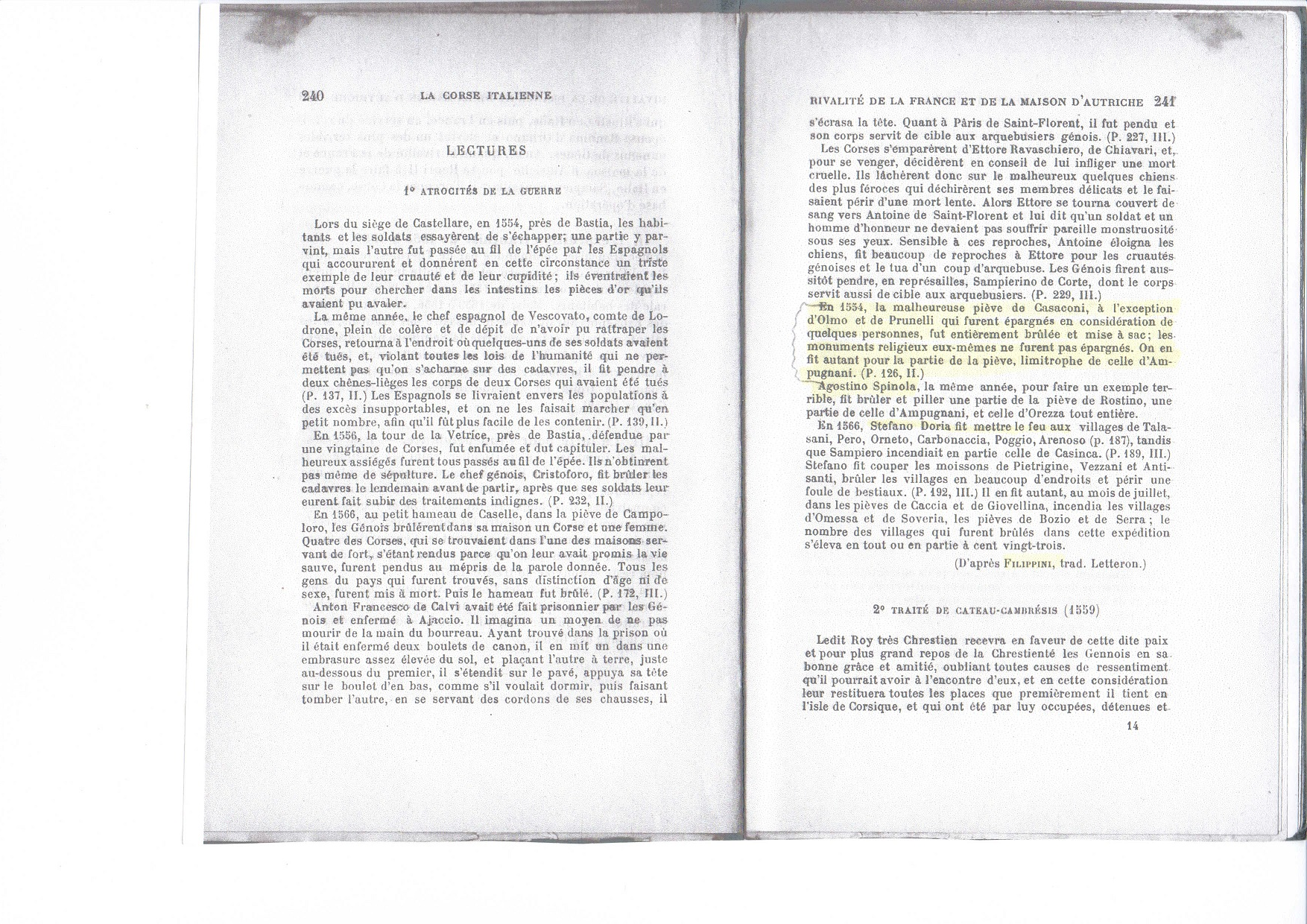 DOCUMENT TEXTE